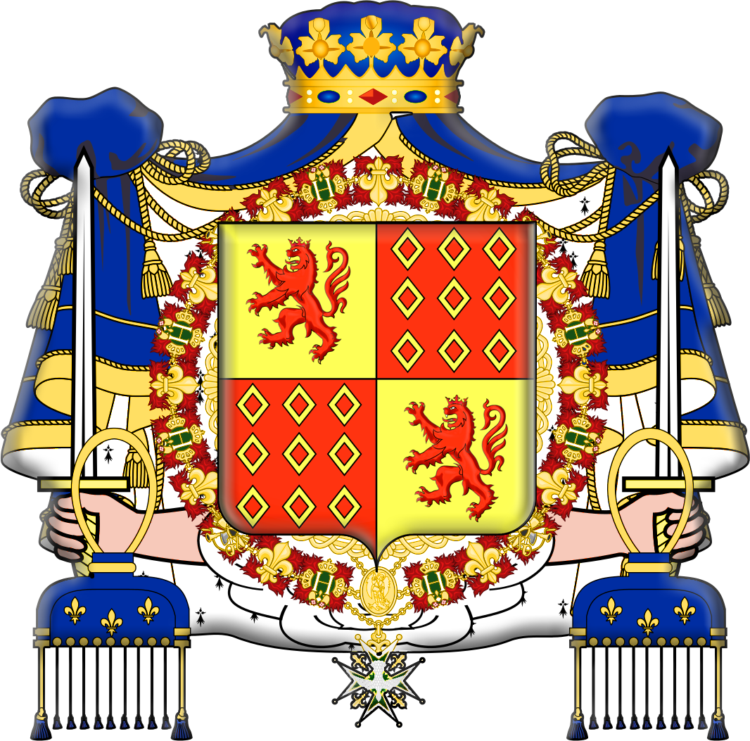 Armes de Charles d'Albert, 1er duc de Luynes (avec un dessin de Jimmy44)